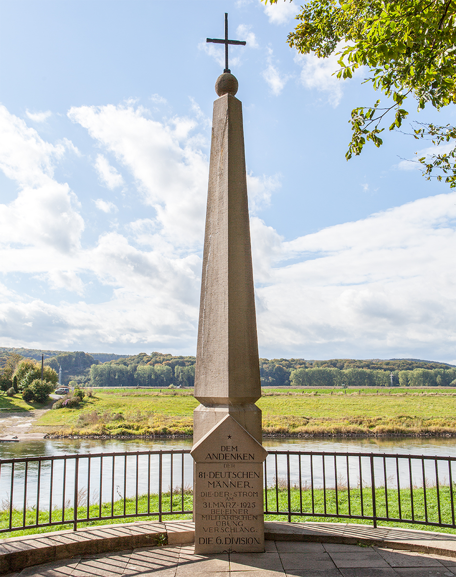 Denkmal zum Fährunglück von 1925 in Veltheim (Porta Westfalica)